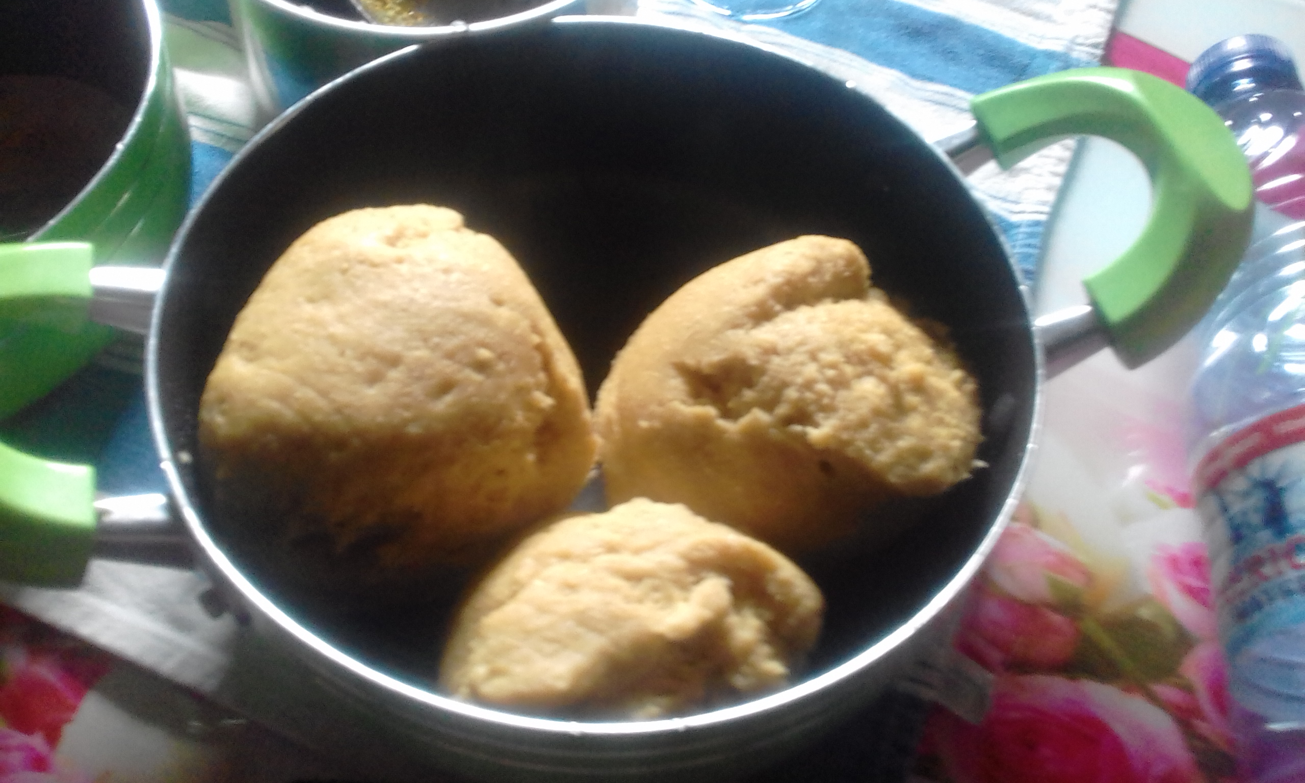 Le "fufu" est l'appelation en langue locale de la farine de maïs ou de manioc. Ici c'est un mélange maïs et manioc.